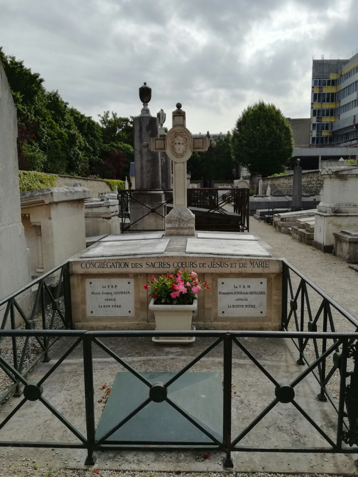 Tumba de Marie-Joseph Coudrin y Henriette Aymer ss.cc. en la Casa de los Sagrados Corazones. Rue de Picpus 37, Paris, France.